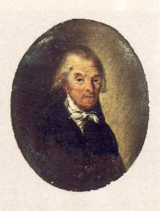 Ippolit Bogdanovich